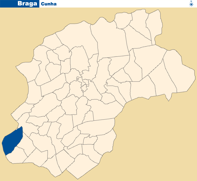 Localização de Cunha no conclho de Braga.